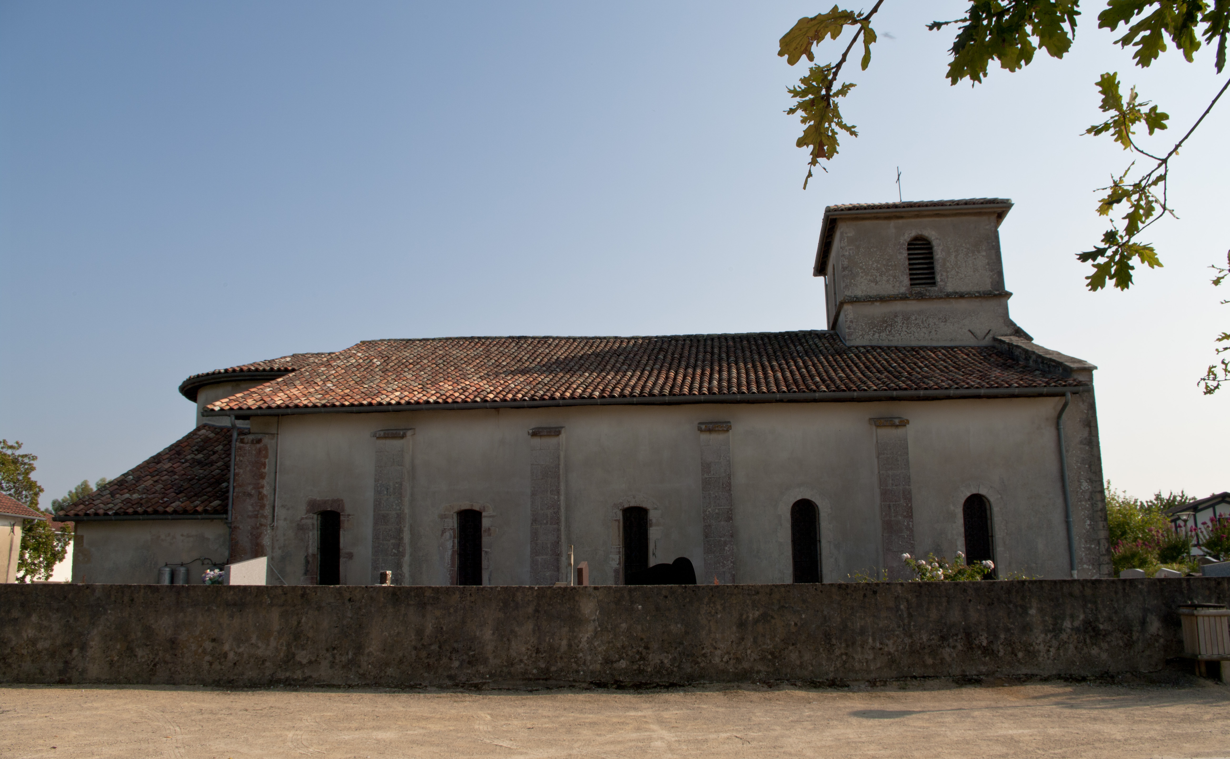 L'église Saint-Martin est un lieu de culte catholique situé dans la commune de Orx, dans le département français des Landes. .